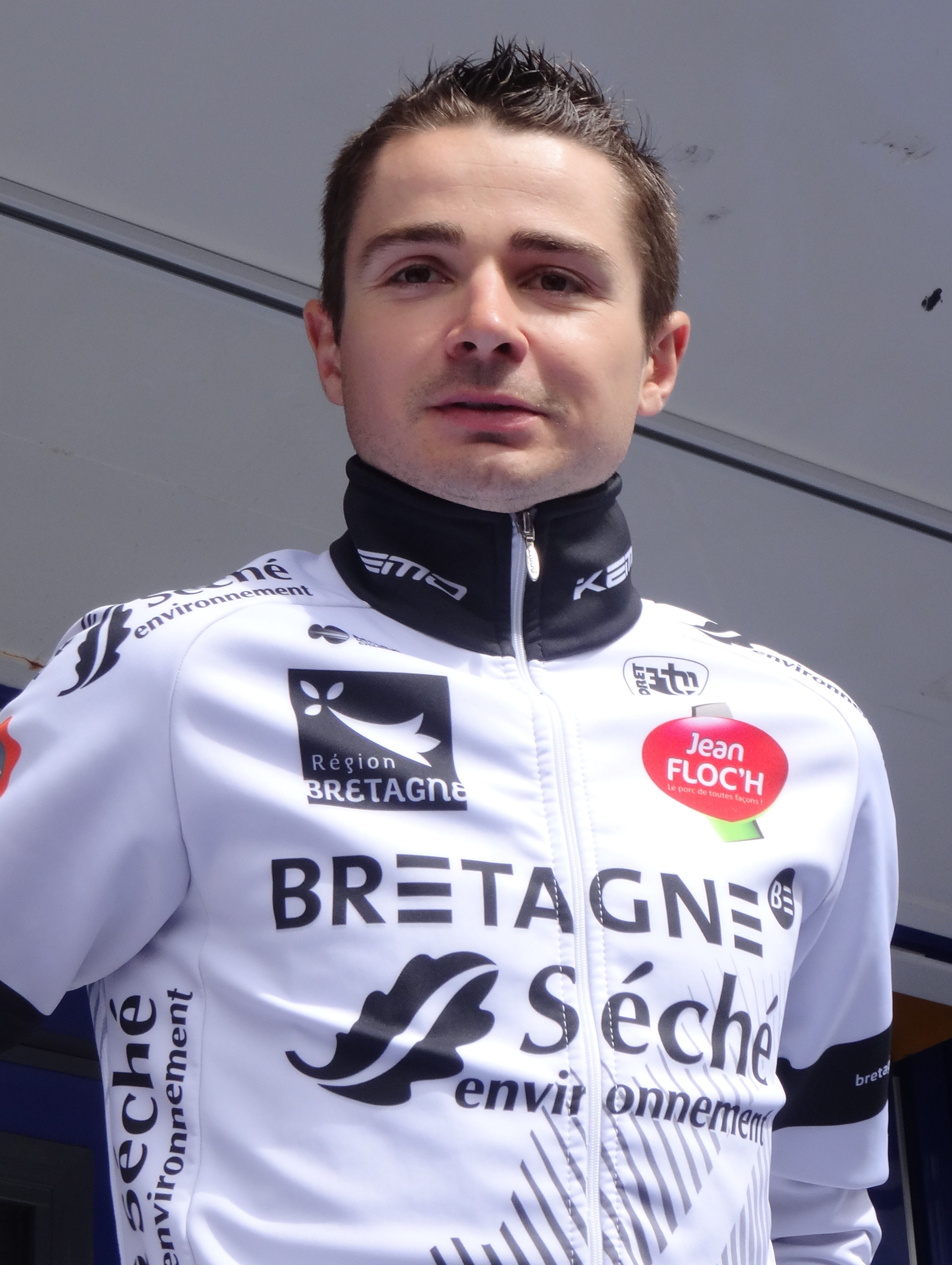 Reportage photographique réalisé le mercredi 7 mai 2014 au départ de la première étape de l'édition 2014 des Quatre jours de Dunkerque à Dunkerque, Nord, Nord-Pas-de-Calais, France. Depicted person: Christophe Laborie Depicted team: Bretagne-Séché Environnement